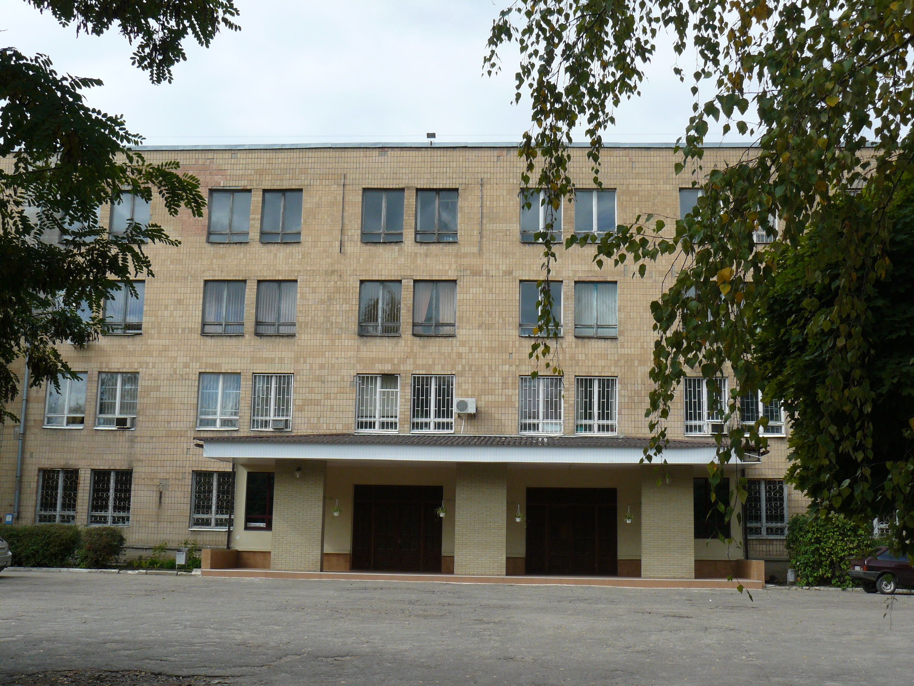 Физико-технический факультет ХНУ. Корпус в Пятихатках